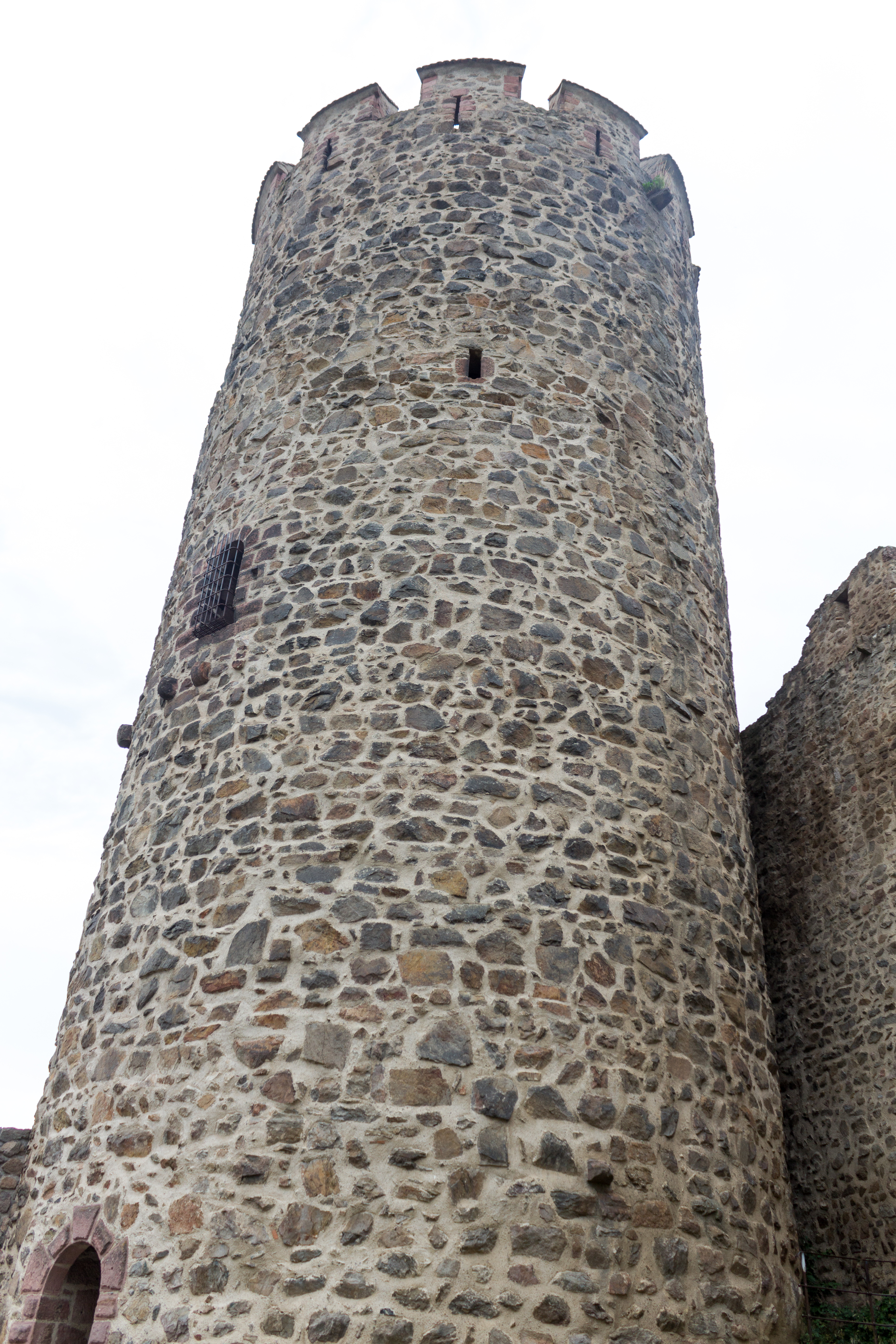 Donjon du château de Kaysersberg